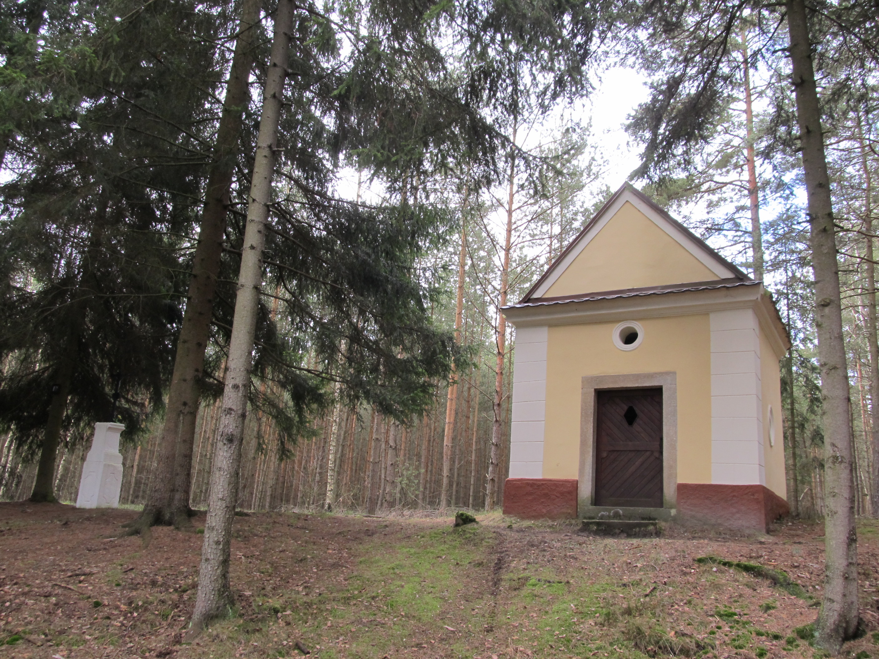 Líté - lesní kaple při cestě na Hvozd